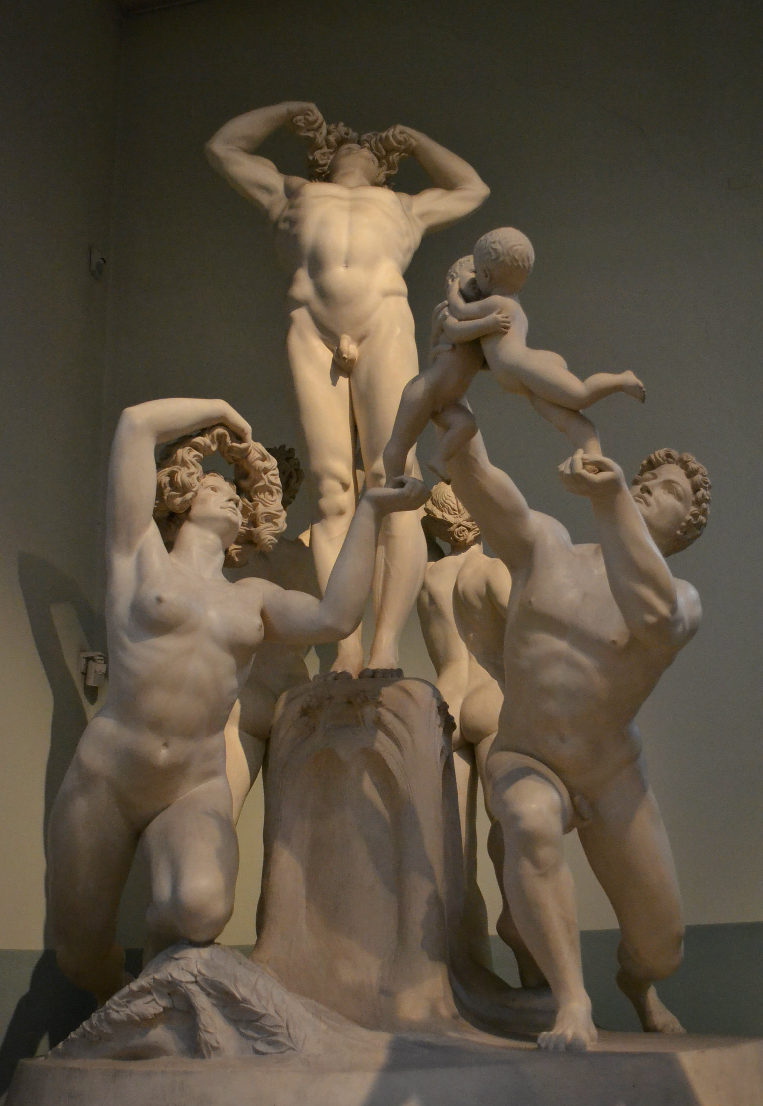 Museo Hendrik C. Andersen - MIBAC This is a photo of a monument which is part of cultural heritage of Italy.